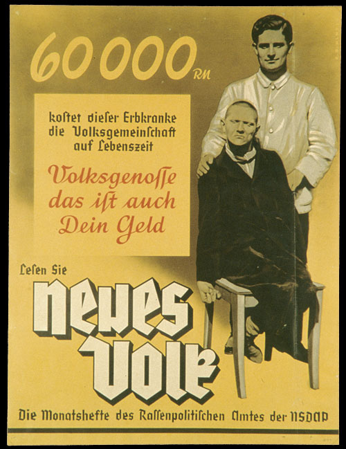 English translation: 60000 RM this is what this person suffering from hereditary defects costs the community during his lifetime Fellow citizen, that is your money, too Read Neues Volk ([A] New People) The monthly magazines of the Office for Race Politics of the NSDAP